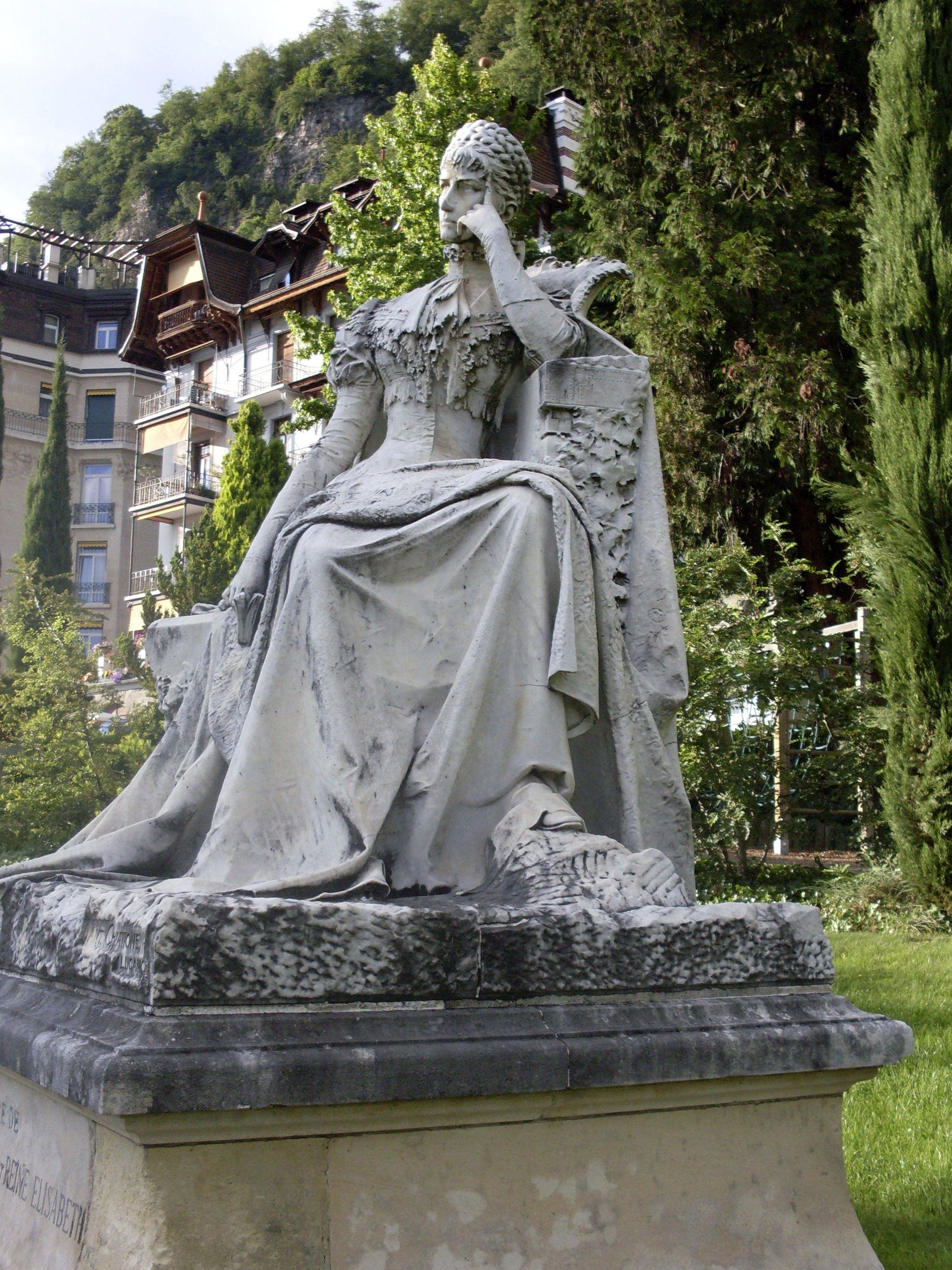 Impératrice Elisabeth, statue par Antonio Chiattone de 1902 - place des Roses, Montreux-Territet, Suisse. Inscription sur le socle A la mémoire de sa majesté l'impératrice et reine Elisabeth en souvenir de ses nombreux séjours à Montreux